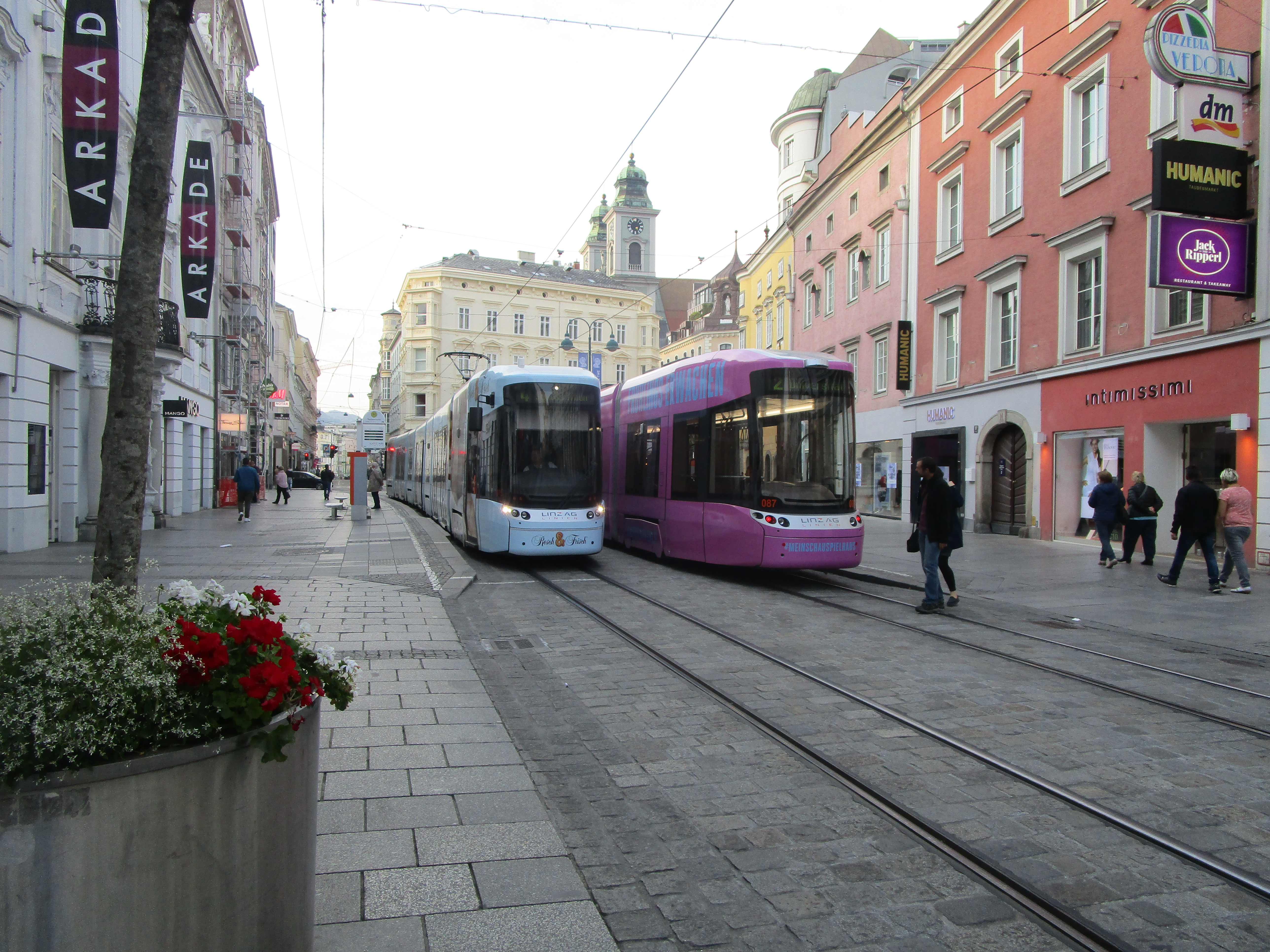 Cityrunner 087 und CR 075 kreuzen am 1.10.2017 am Taubenmarkt